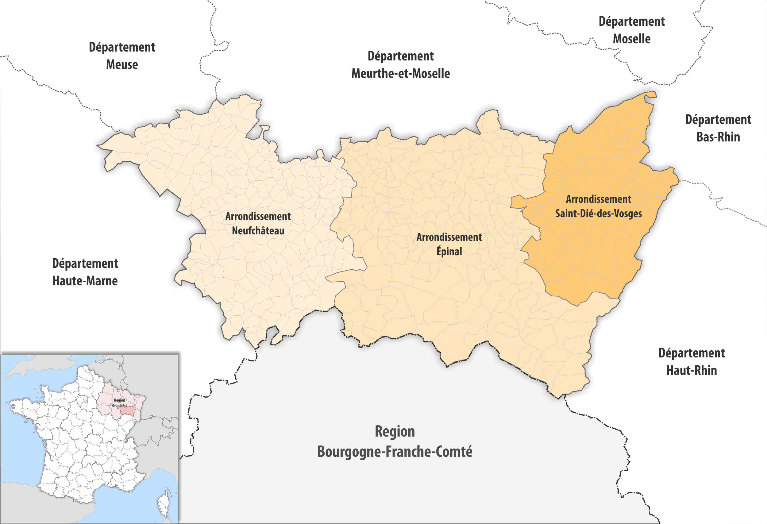 Gemeinden und Arrondissemente im Departement Vosges